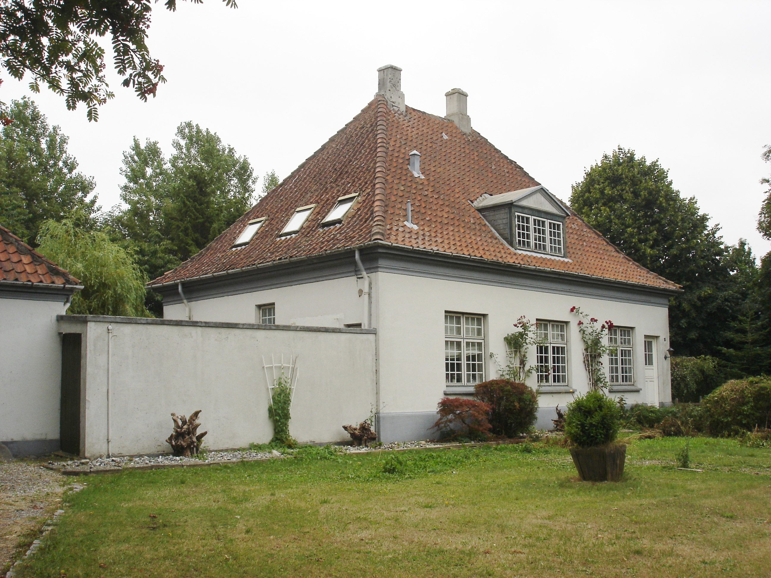 Horbelev Station, vejsiden fra NV